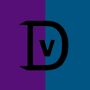 Hierro y divisa de la ganadería de Diego Ventura, situada en Samorra Correia (Portugal)